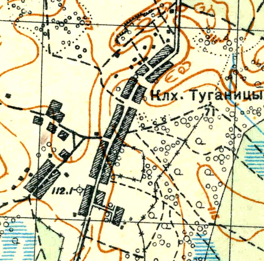 Топографическая карта Ленинградской области, квадрат О-35-24-Б-б (Колхоз Туганицы), деревня Туганицы